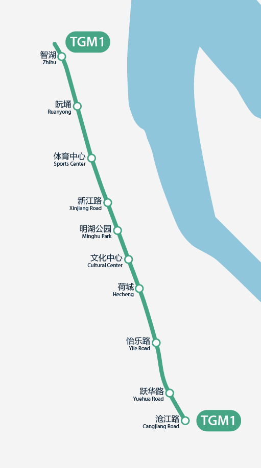 高明有軌電車1號線線路圖，按真實走向比例繪畫